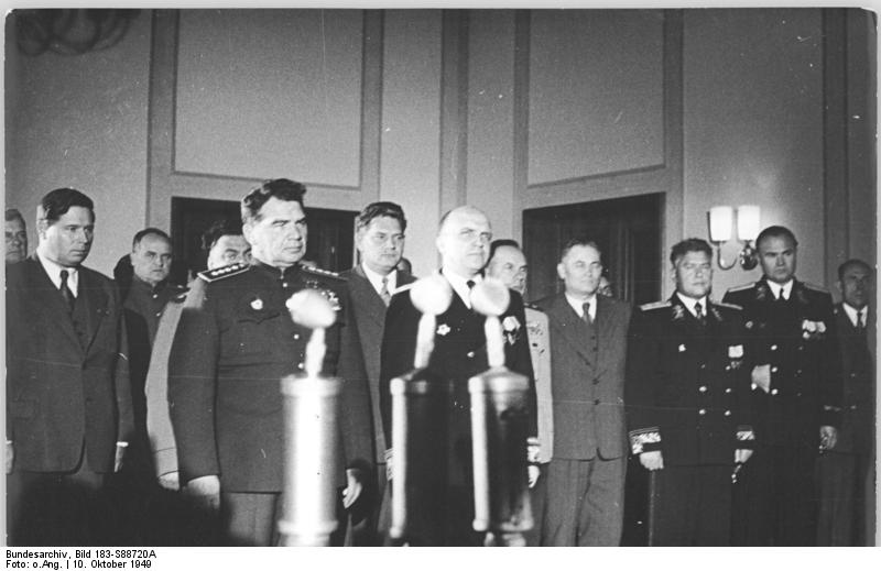 ADN-ZB/SNB Gründung der Deutschen Demokratischen Republik am 7.10.1949. Armeegeneral W.J. Tschuikow empfing am 10.10.1949 in Berlin-Karlshorst das Präsidium der Provisorischen Volkskammer der Deutschen Demokratischen Republik und den Ministerpräsidenten Otto Grotewohl in Anwesenheit des Außerordentlichen Botschafters der UdSSR in Deutschland W.S. Semjonow. UBz: Armeegeneral W.J. Tschuikow und der Außerordentliche Botschafter der UdSSR W.S. Semjonow mit ihren Stäben. 4153-49 10. Oktober 1949